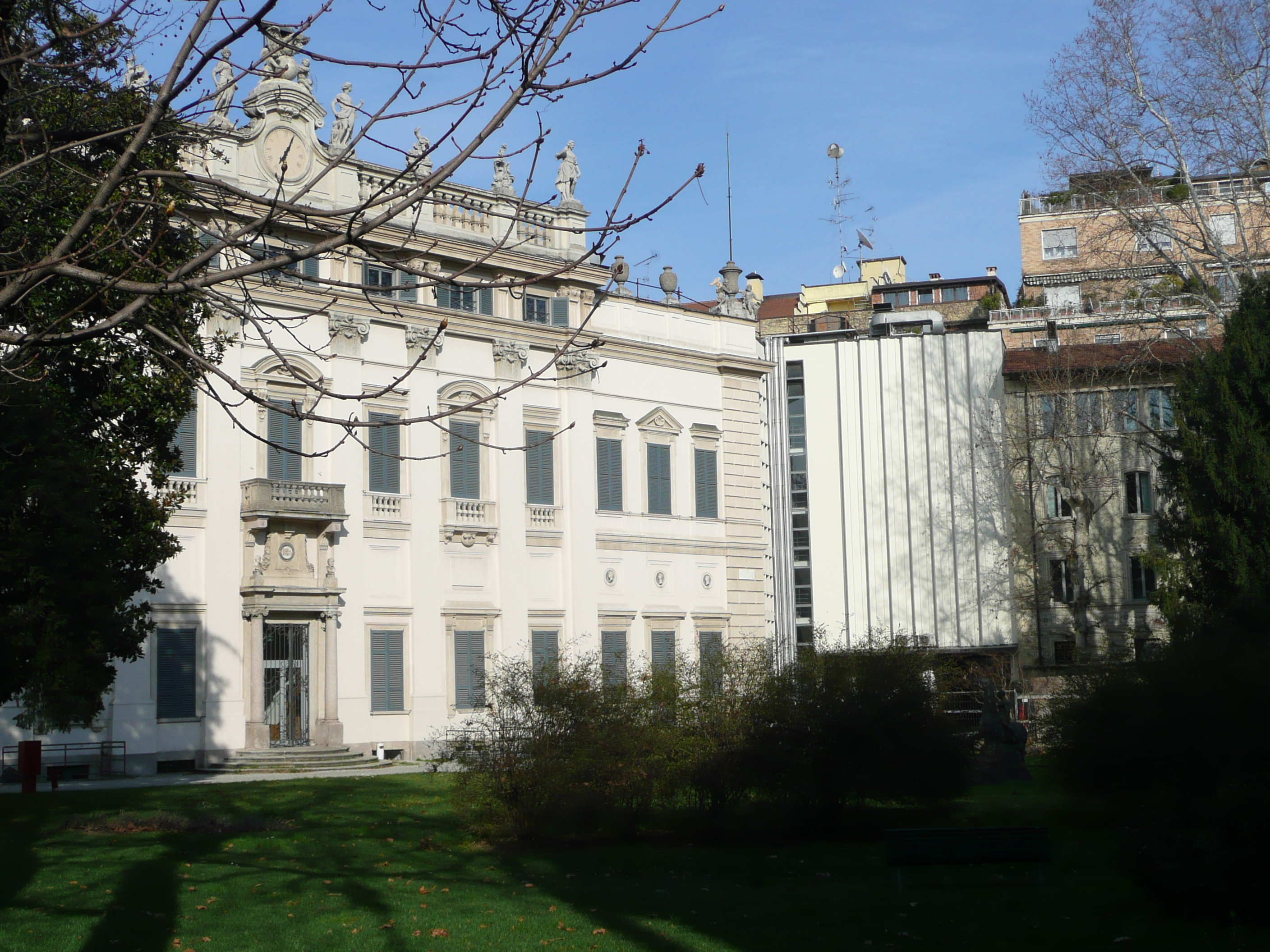 Palazzo Sormani Andreani a Milano, facciata posteriore di Benedetto Alfieri